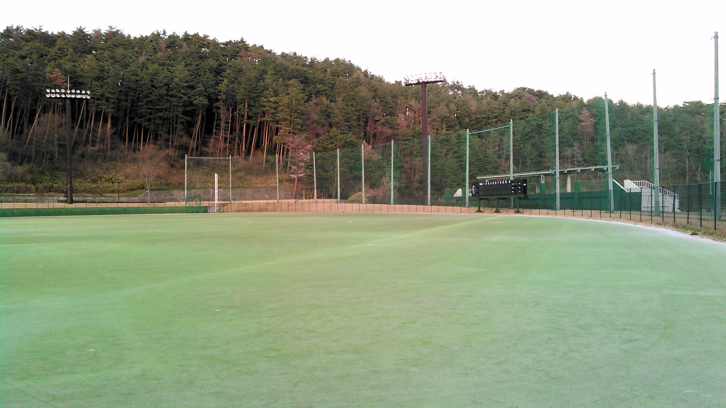 磐梯熱海スポーツパークの多目的グラウンド（野球場）